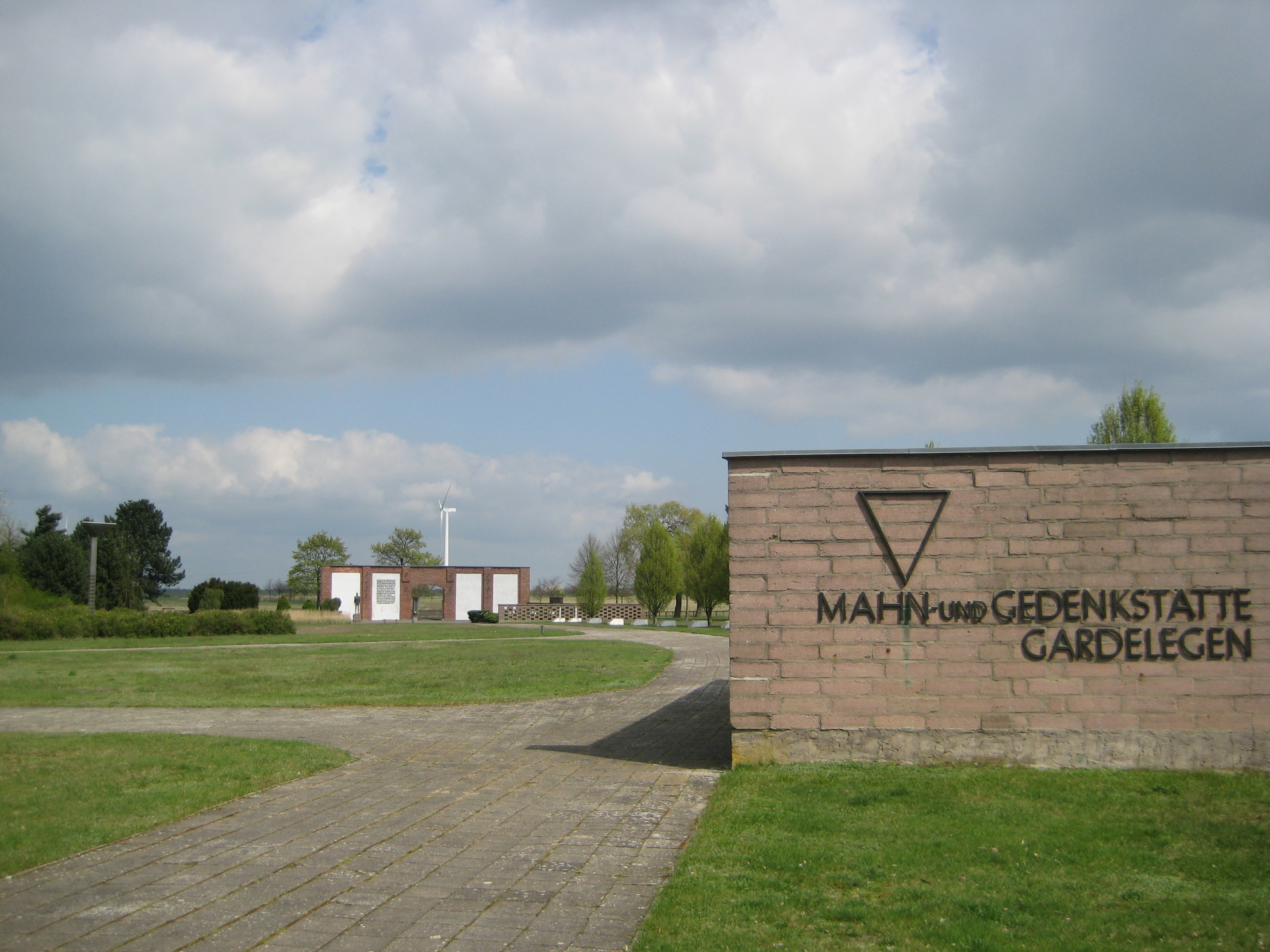 Memorial - front of the barn